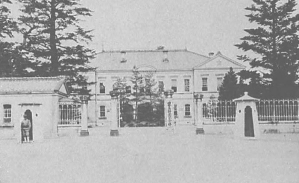 第三師団司令部 名古屋市